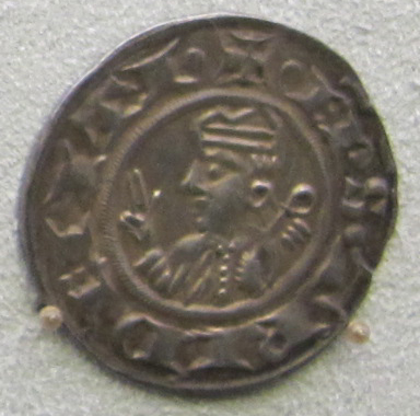 Vescovo di trento, grosso, 1255-1269 ca